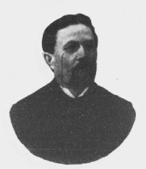 Jan Pospíšil (1845-1925), rakouský a český politik